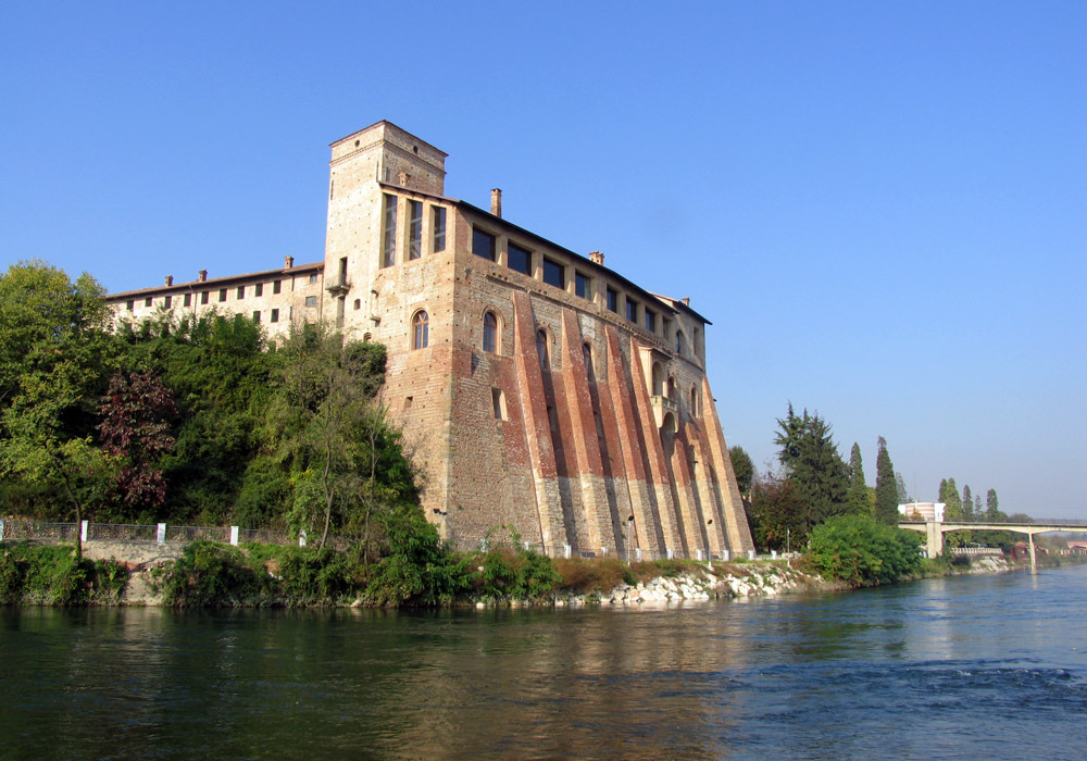 Castello di Cassano 11/2006